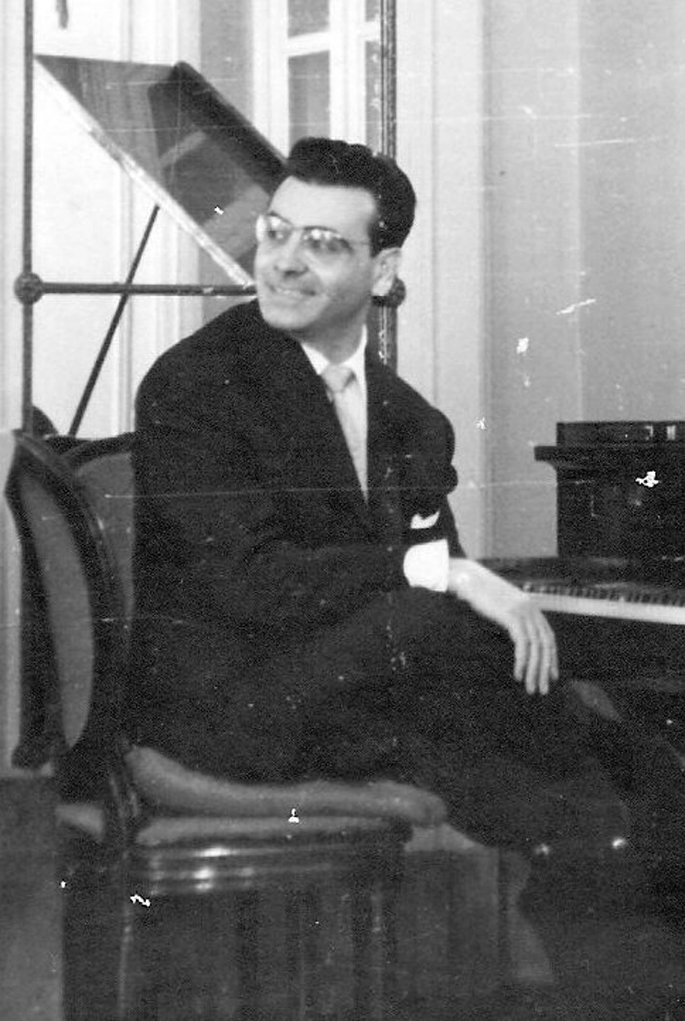 El pianista Josep Vicens i Busquets a l'Hotel Ritz de Barcelona